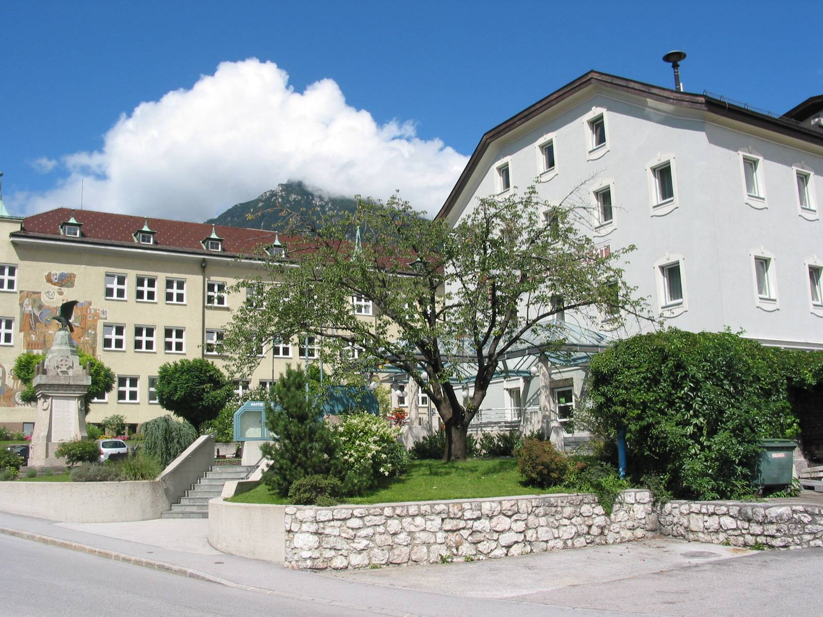 de: Gemeindeamt in Jenbach en: municipal office of Jenbach